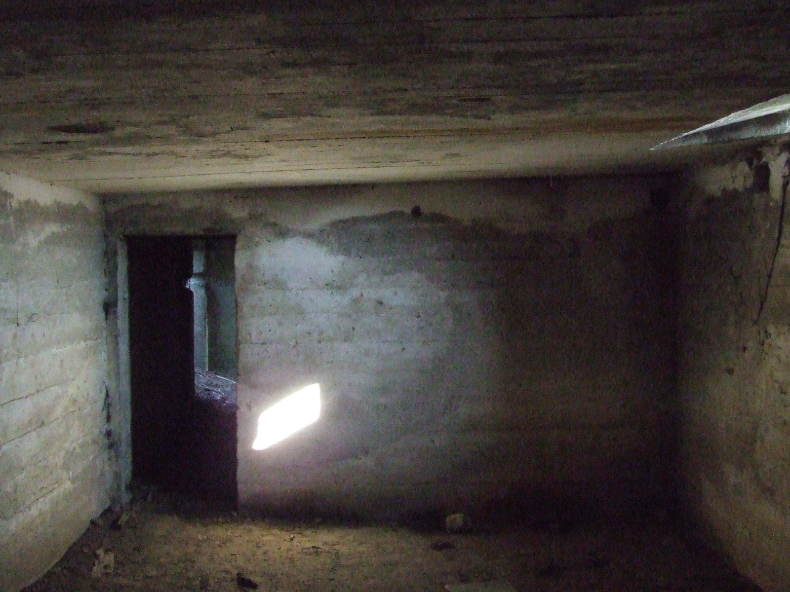 Pomieszczenie główne bunkra w Garaszewie - Poznań